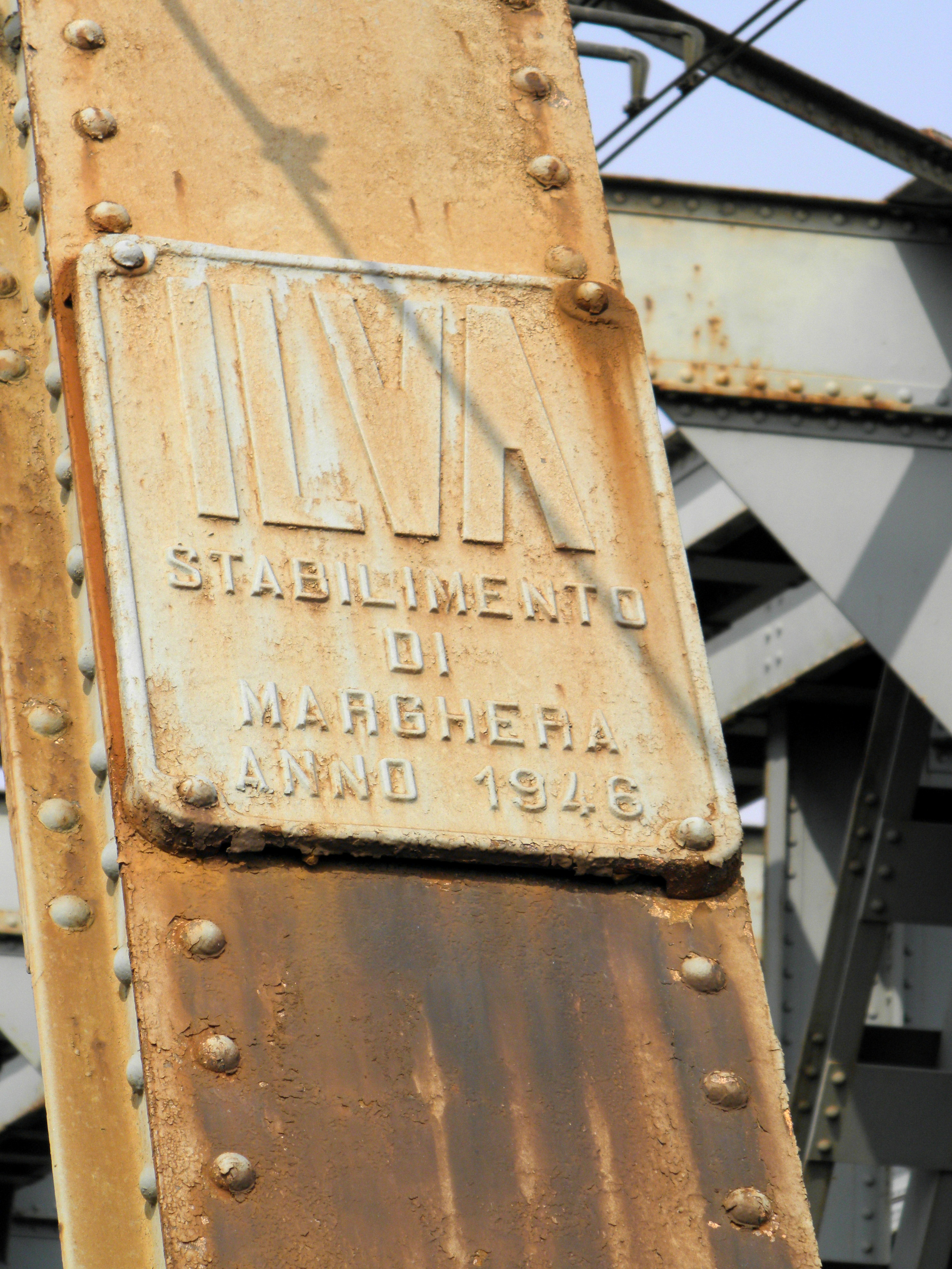 Ponte ferroviario in ferro sull'Adige, linea Bologna-Padova, che collega Granzette, frazione di Rovigo, con Boara Pisani, provincia di Padova.